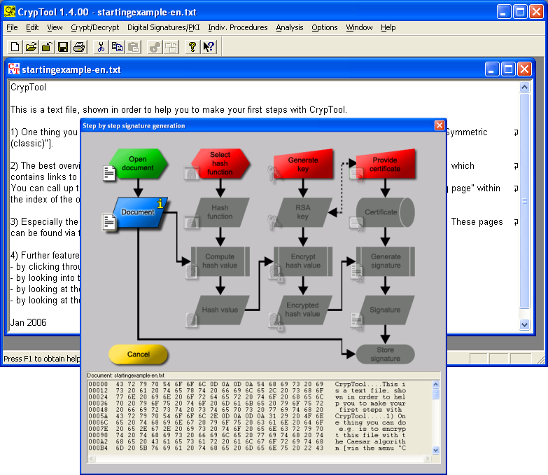 Bildbeschreibung=Screenshot zur englischen Version des Kryptologie-Lernprogramms CrypTool Quelle=Bild selbst erstellt Erstellungsdatum=2006-07-27